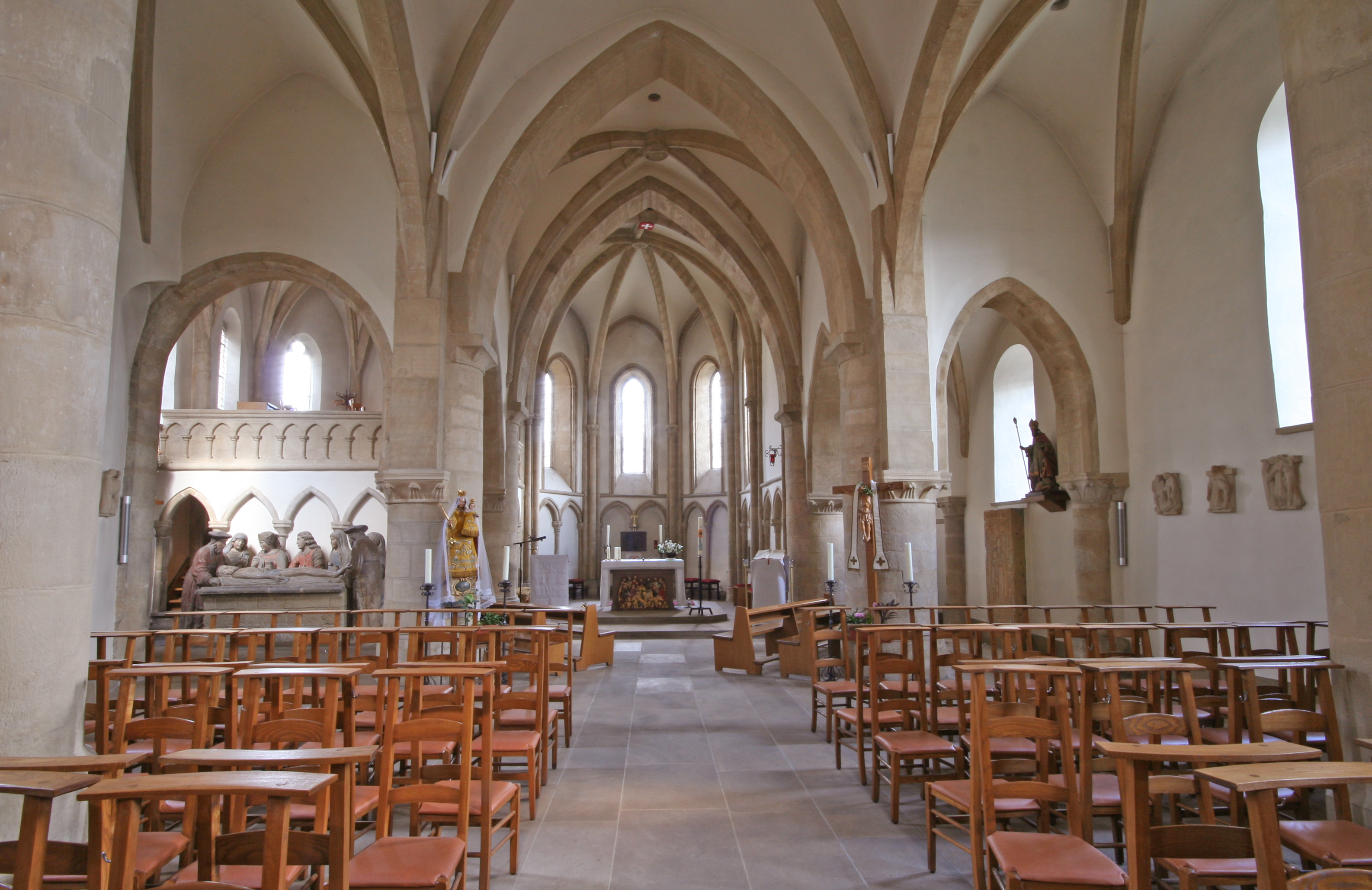 Kierch Simmer. Kategorie:Gemeng Simmer Simmer